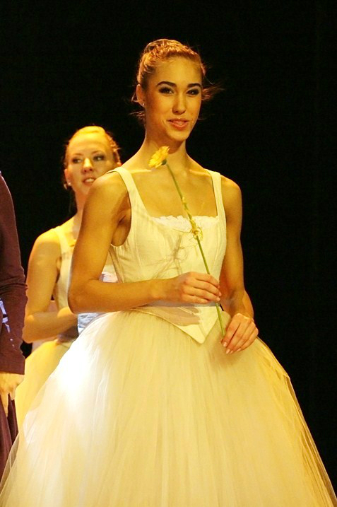 Ida Nowakowska jako Meg Giry w musicalu "Upiór w Operze", Teatr Muzyczny Roma w Warszawie, 11 października 2008.